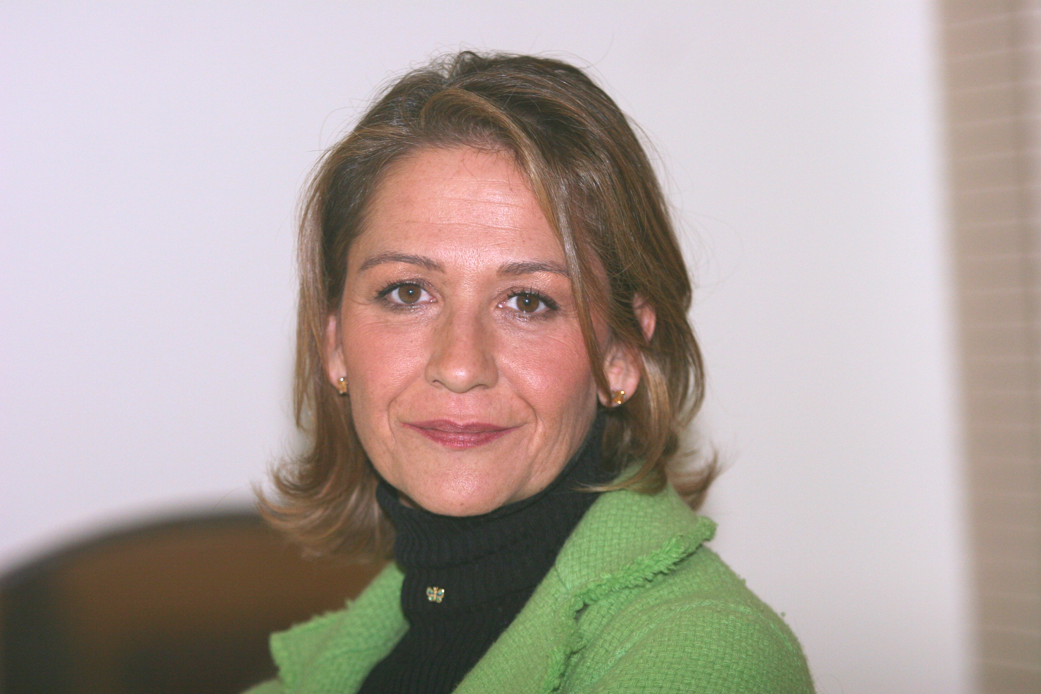 Inmaculada Rodríguez-Piñero Fernández (Madrid, 7 de enero de 1958) es una política española